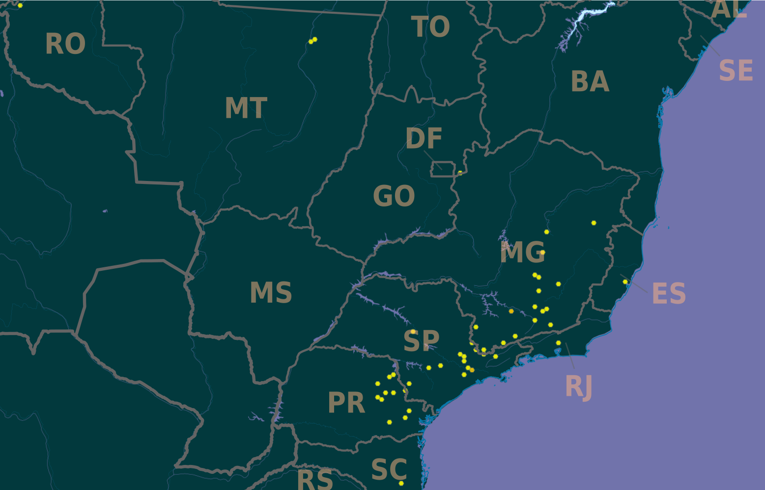 Mapa distribucional de Leucochloron incuriale. gbif